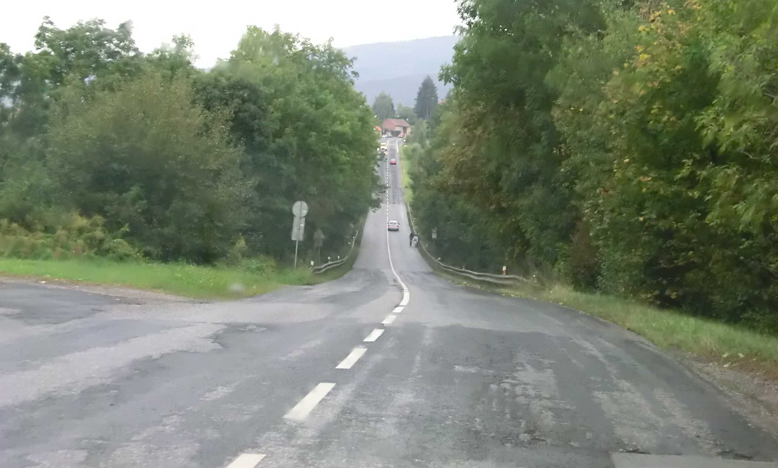 Silnice II/286 před městečkem Železnice - vlevo odbočuje stará silnice, světlý úsek uprostřed dolíku je nově opravená část (léta zde býval "hup" nad propustkem potoka)